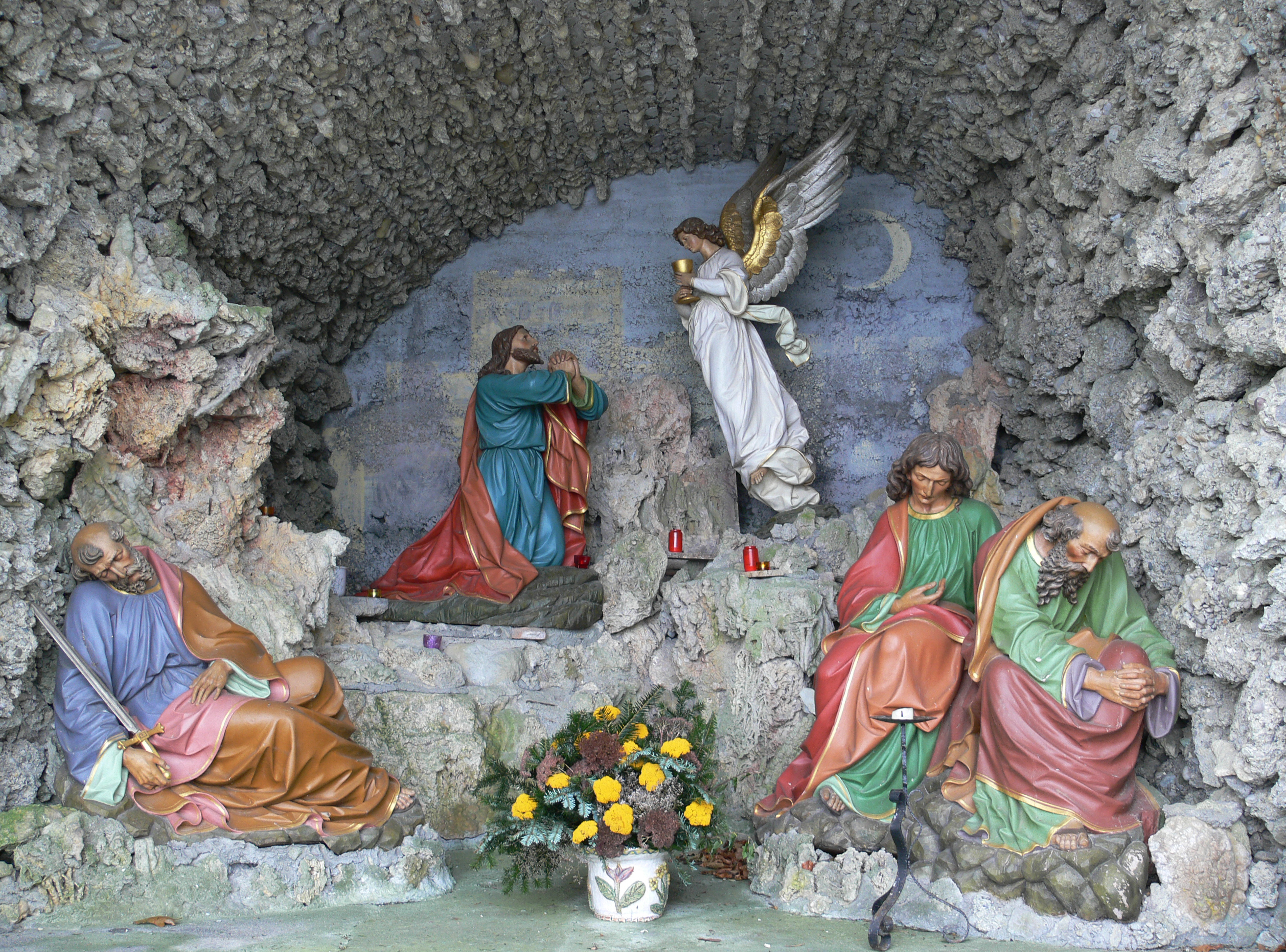 Horgenzell, Andachtsstätte „Föhrenbühl“ in Wolketsweiler: Ölberg Skulpturen von Moriz Schlachter, 1898